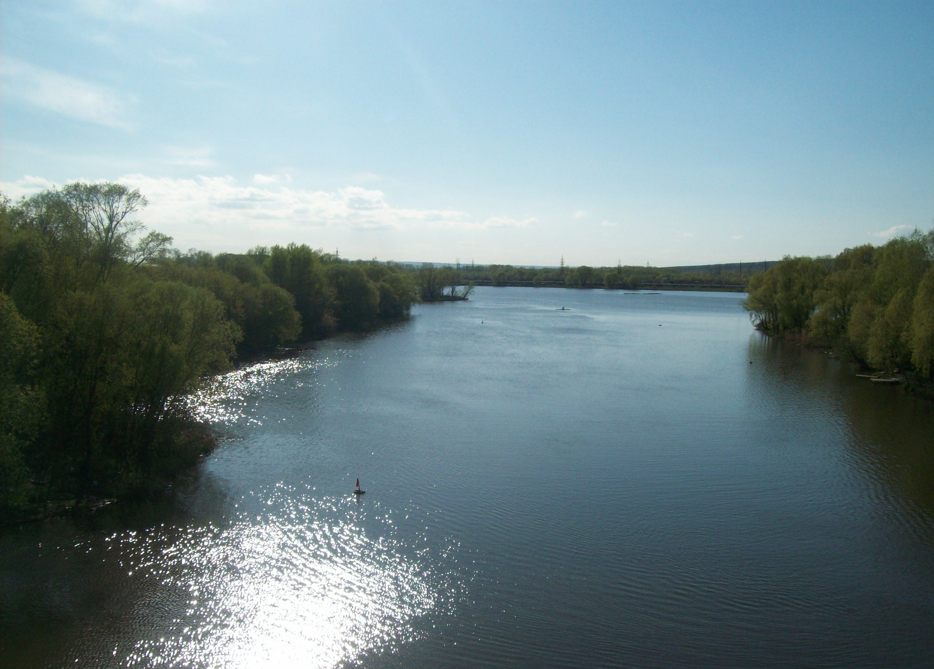 Россия, г. Ульяновск, река Свияга.